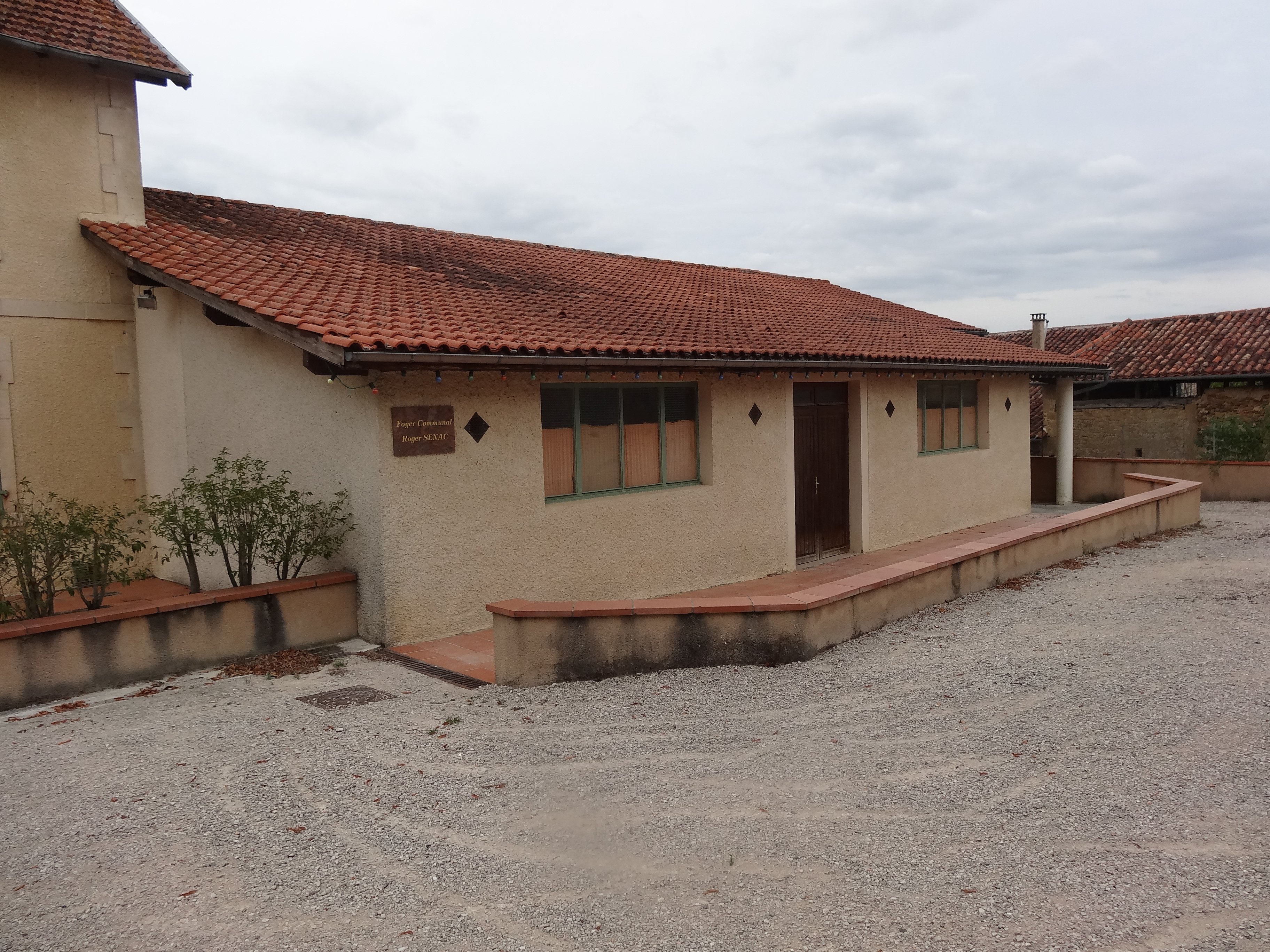 Foyer communal de Mont-de-Marrast.